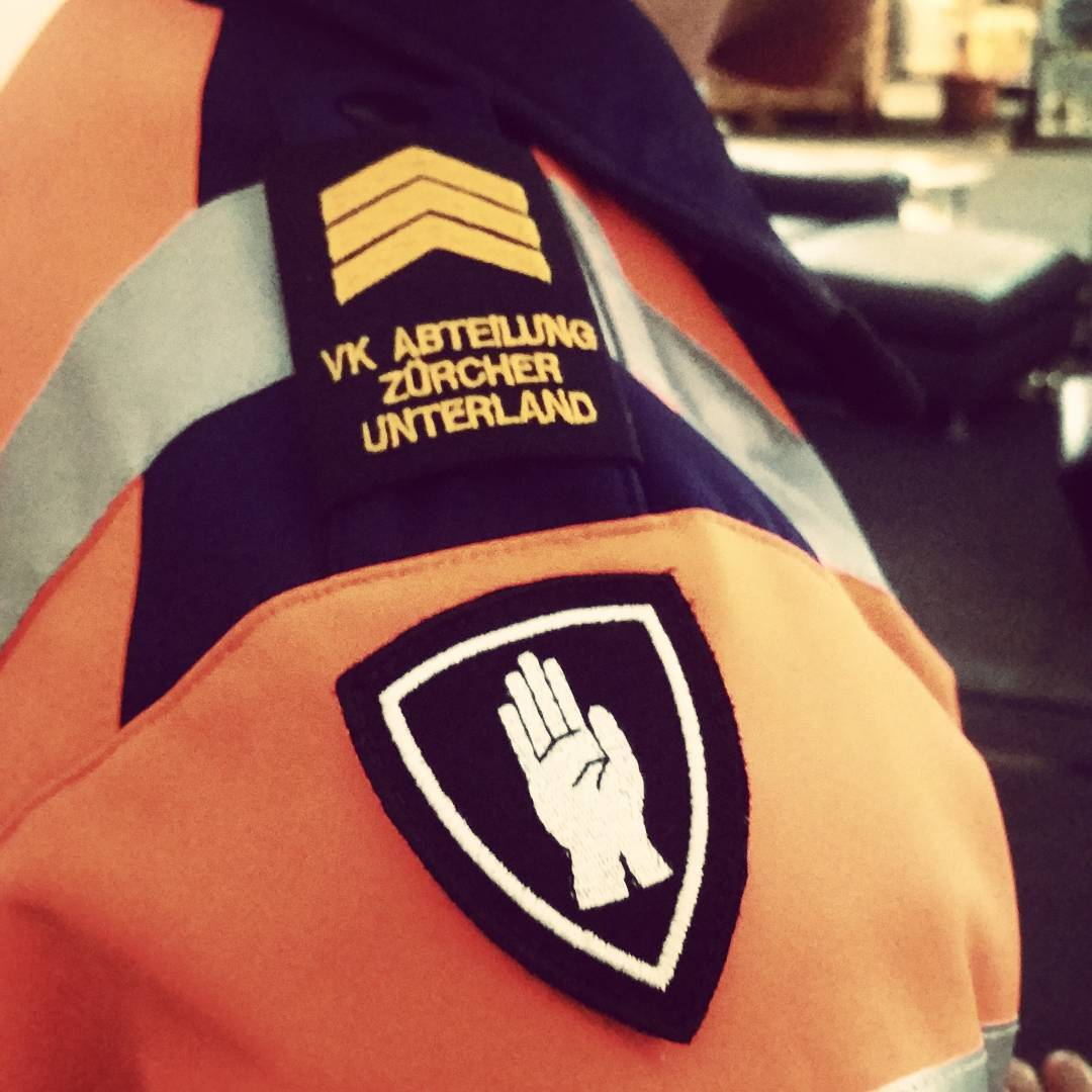 Nach bestandener Prüfung für einen höheren Rang, bekommt das Kader das Abzeichen "Weisse Hand" verliehen.